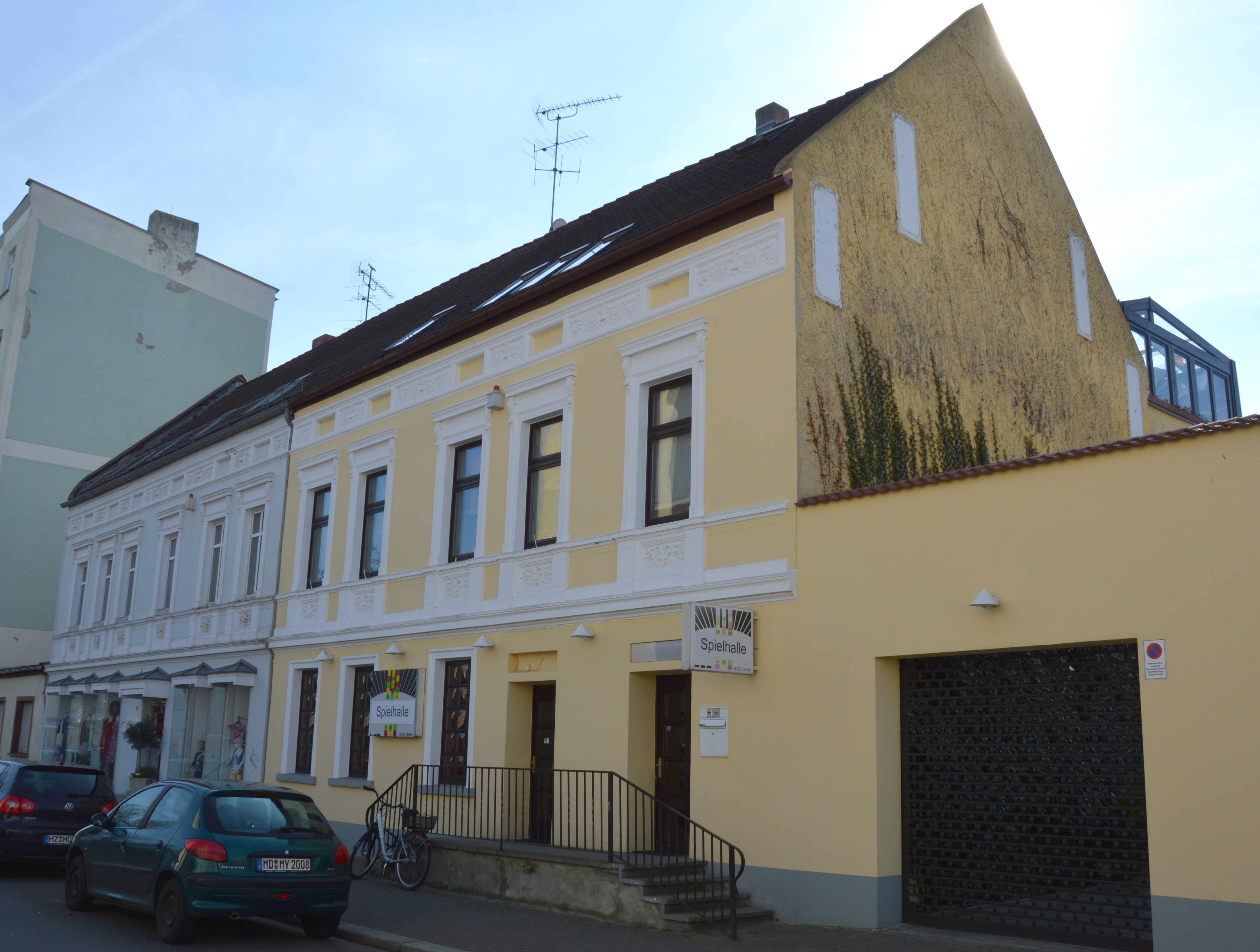 Haus Ritterstraße 16, 17 in Magdeburg